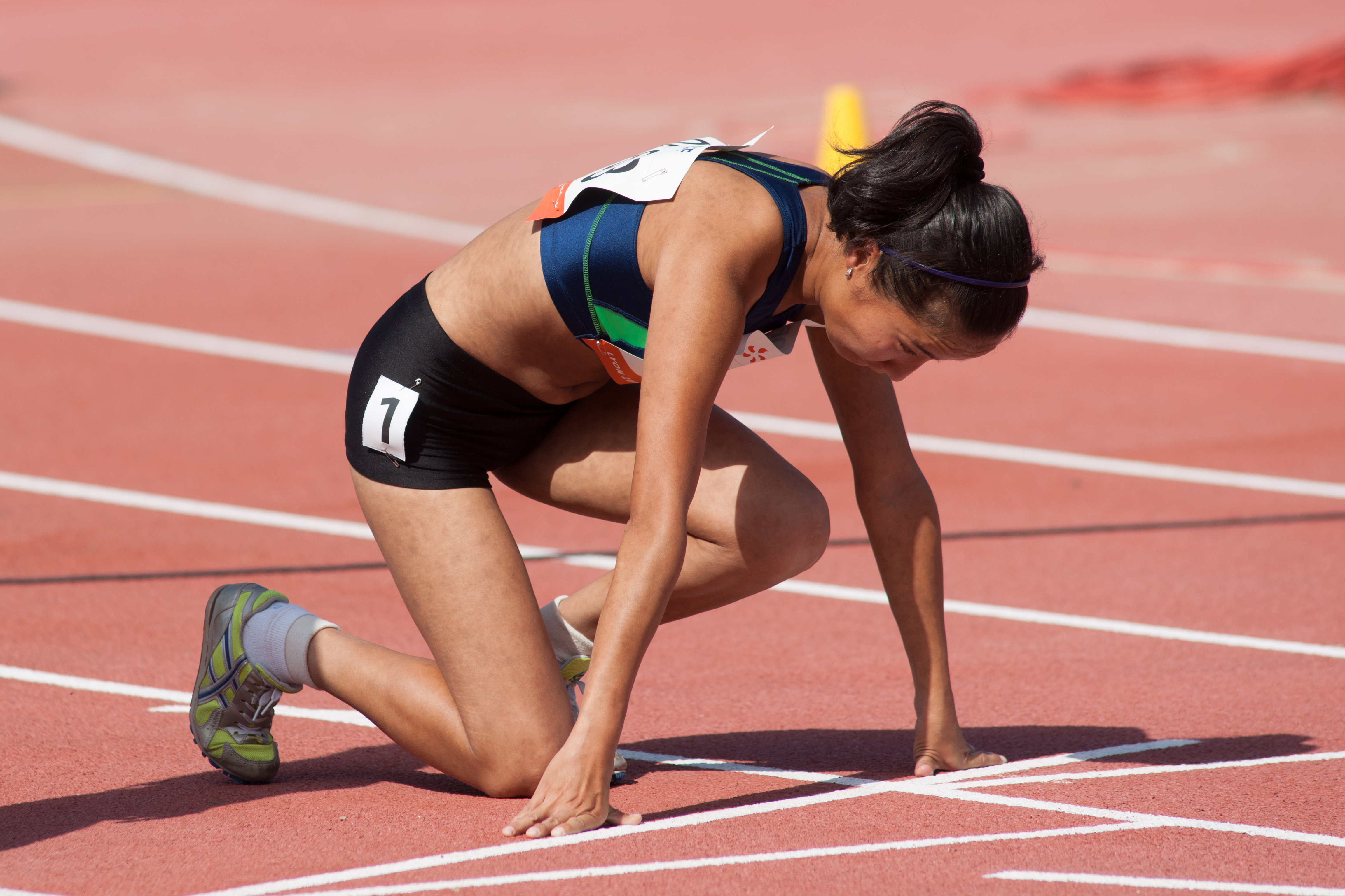 Championnats du monde d'athlétisme IPC 2013. 100 mètres féminin T36.